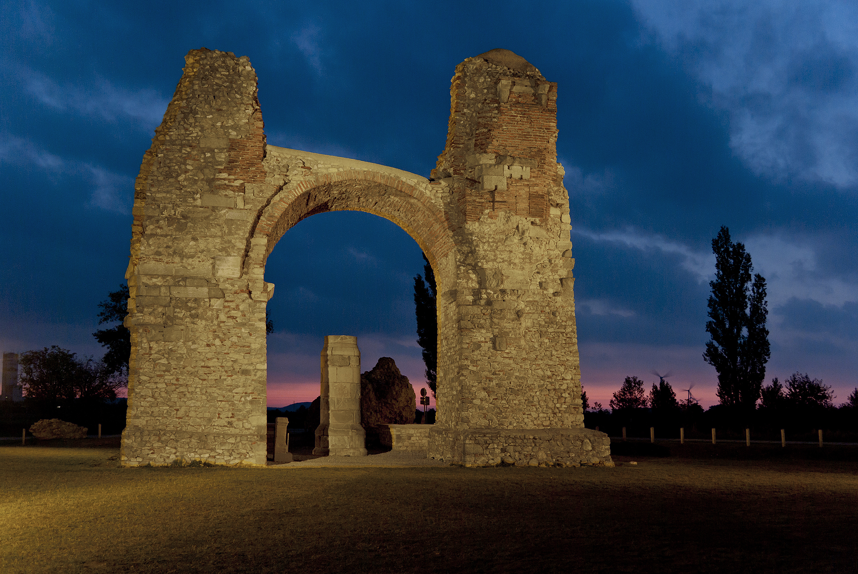 Archäologischer Park Dieses Bild wurde anlässlich des österreichischen Tags des Denkmals 2015 in Niederösterreich eingereicht.